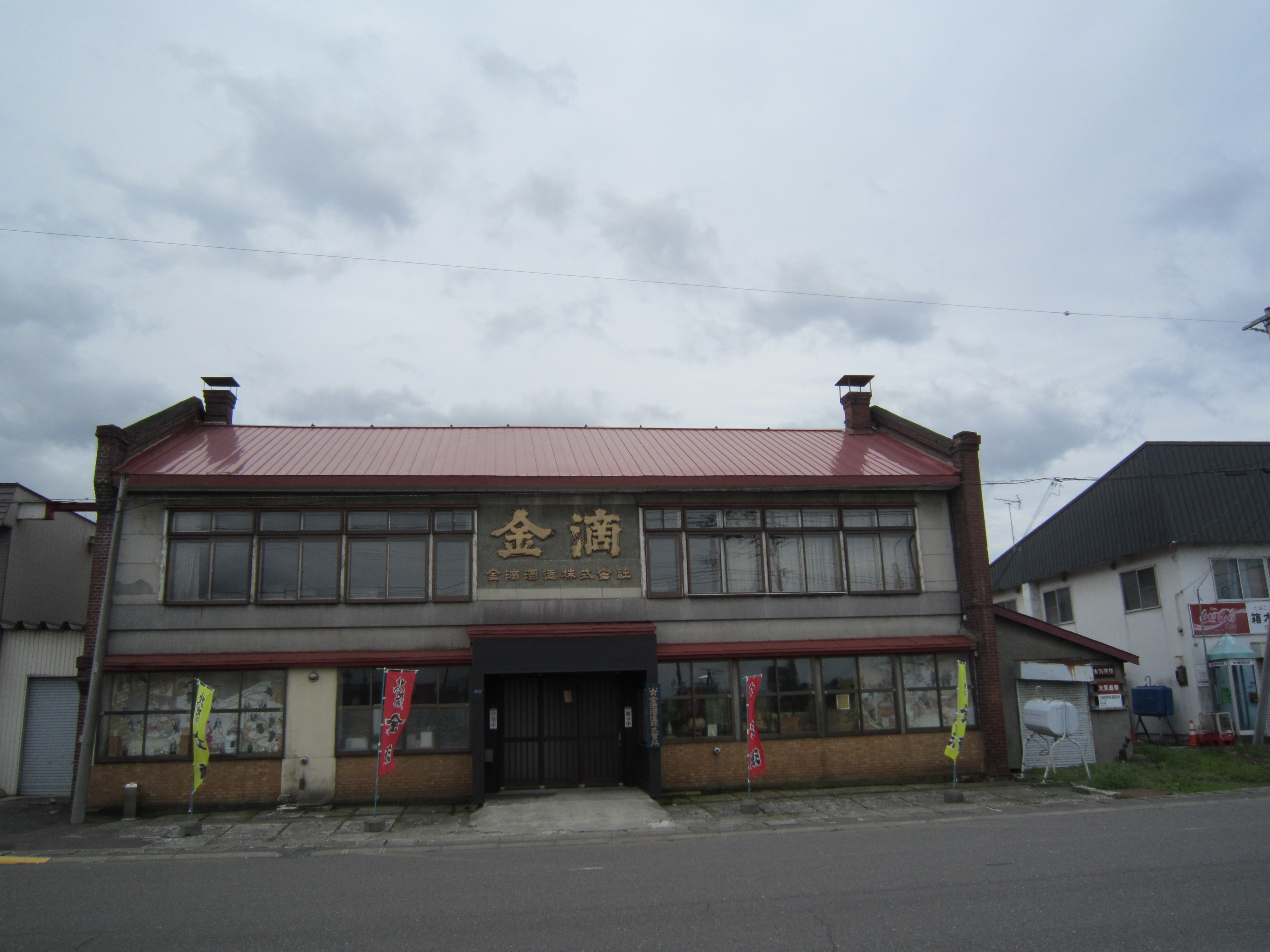 金滴酒造。新十津川町